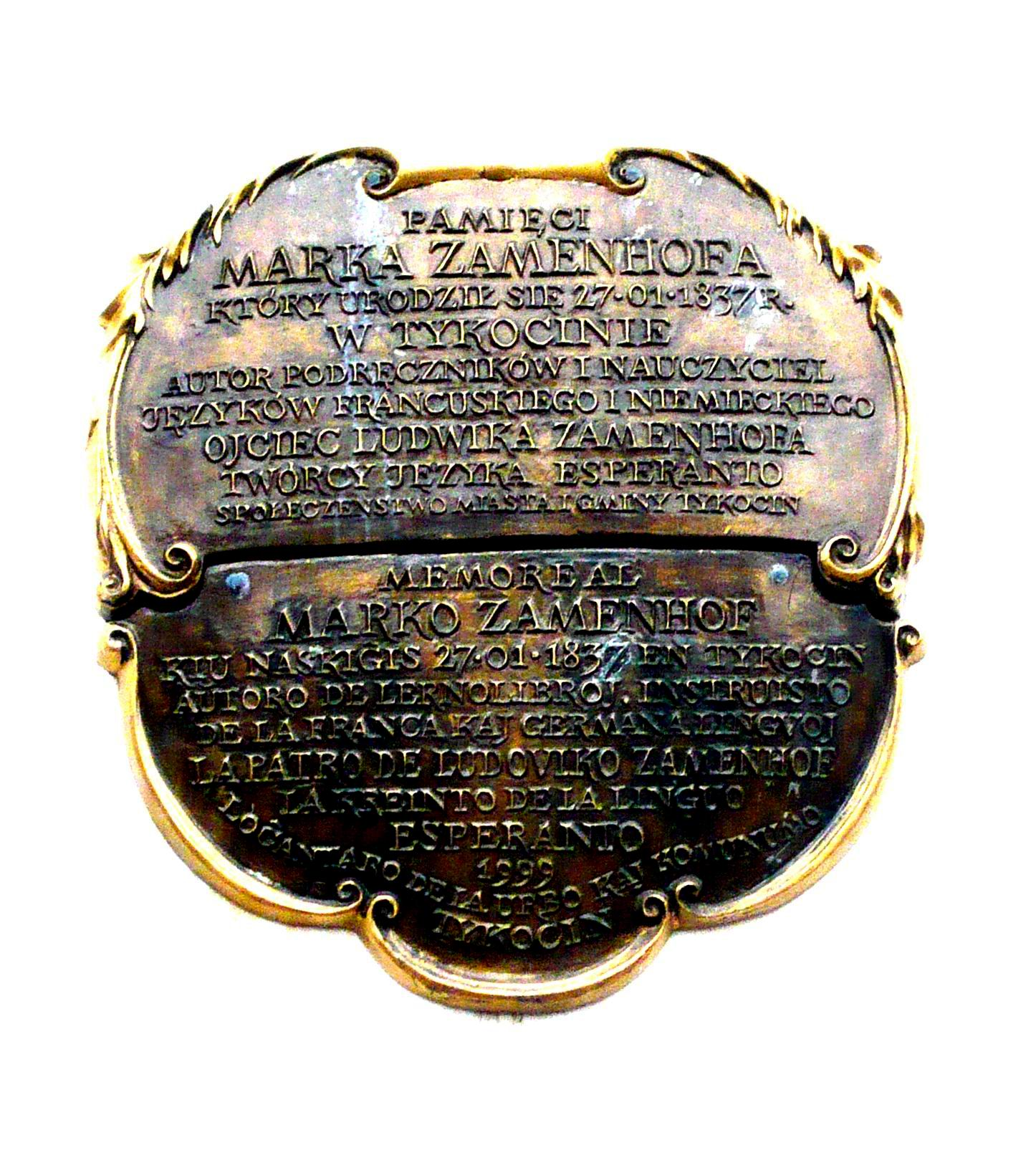 La memortabulo al Marko Zamenhof, patro de Ludoviko, en lia naskiĝurbo - Tykocin.